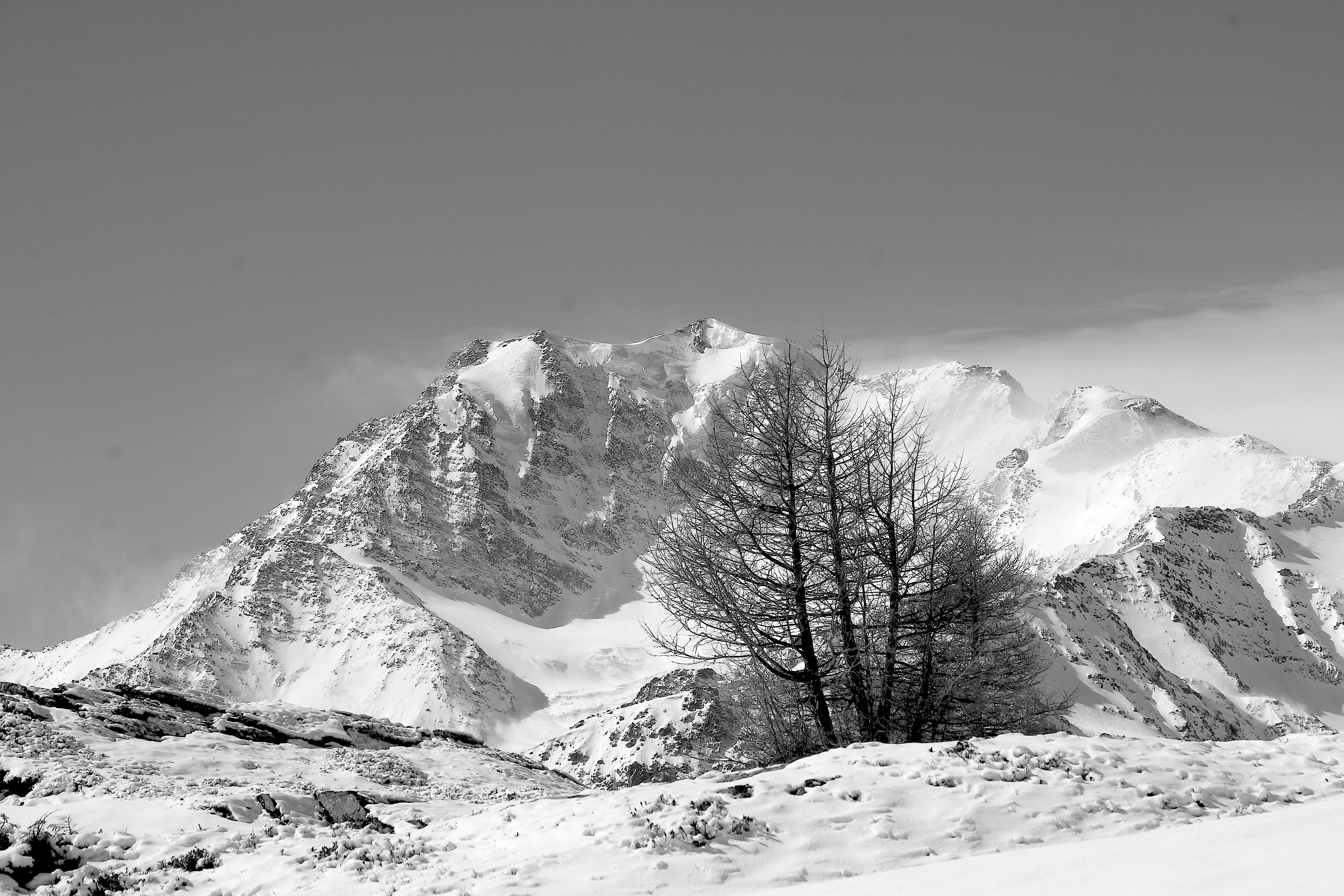 Fletschhorn im Mai 2020